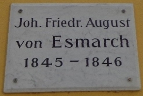 Göttinger Gedenktafel für Friedrich von Esmarch, Chirurg (Goetheallee 4)